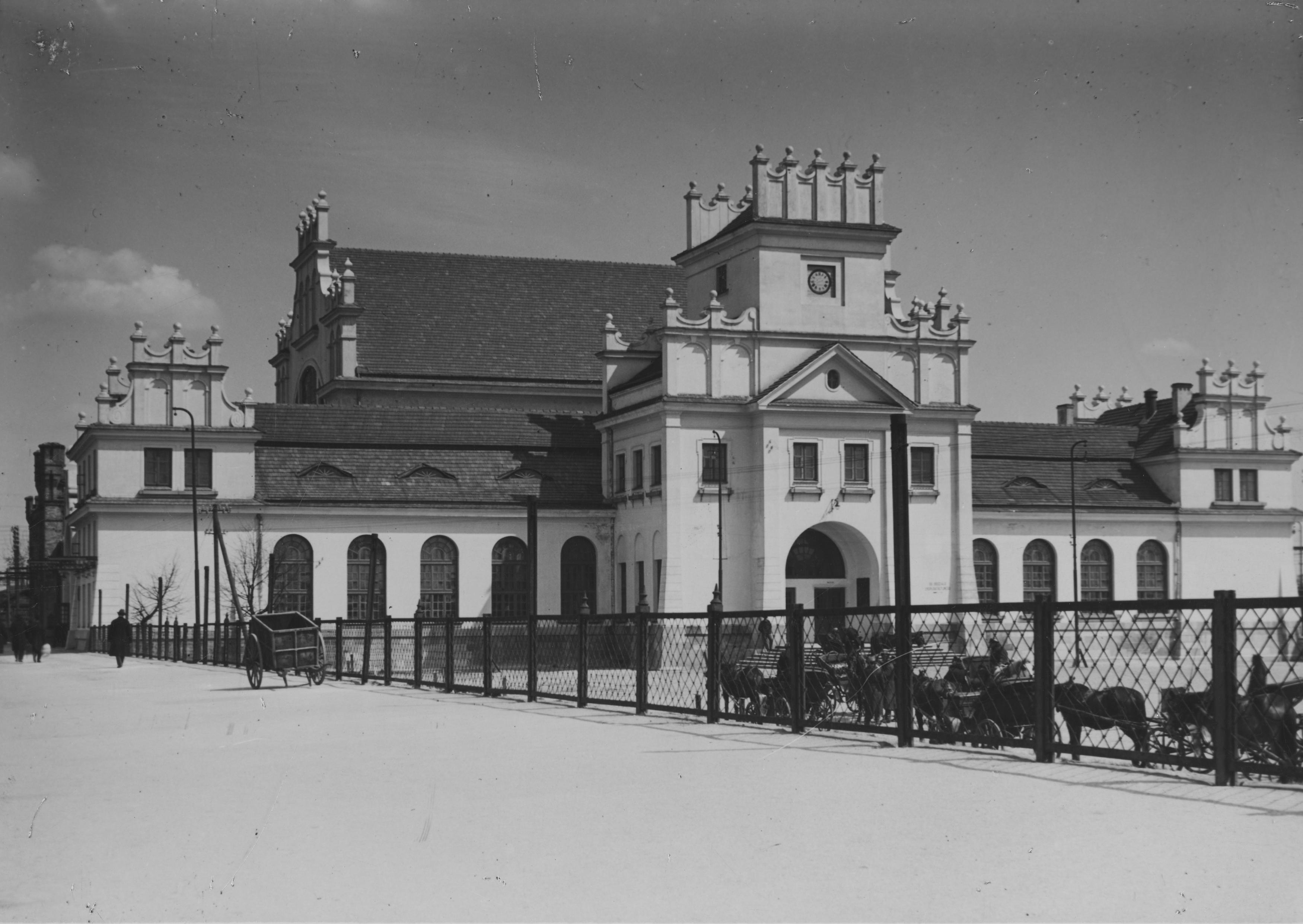 Беларуская (тарашкевіца): Берасьце (Bieraście), пляц Прывакзальны (plac Pryvakzalny). Чыгуначная станцыя Берасьце Цэнтральнае (Bieraście Centralnaje)